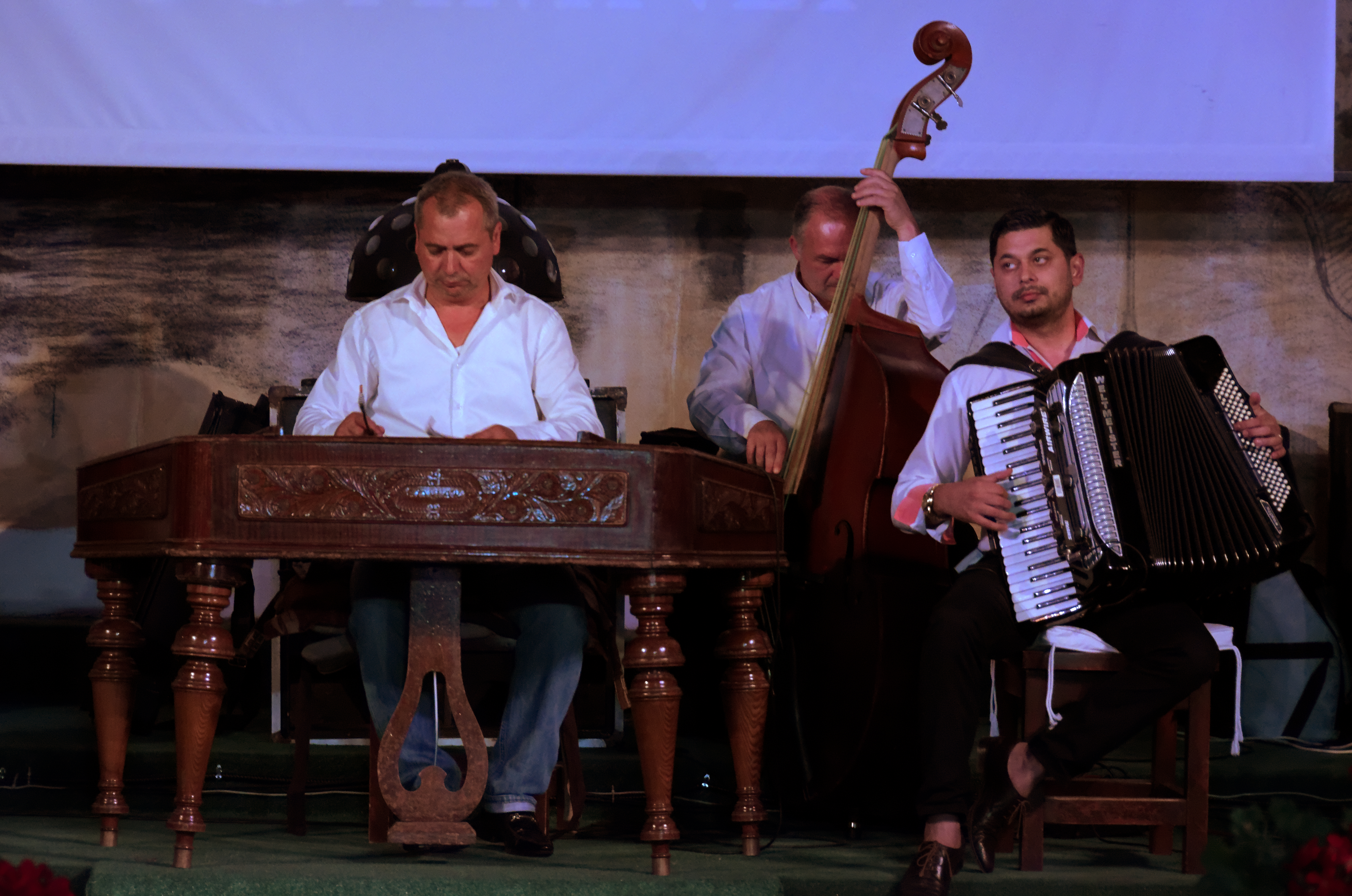 Orchestre roumain jouant au restaurant Terasa Doamnei situé N°9 Str Doamnei à Bucarest. Cymabum, contrebasse et accordéon